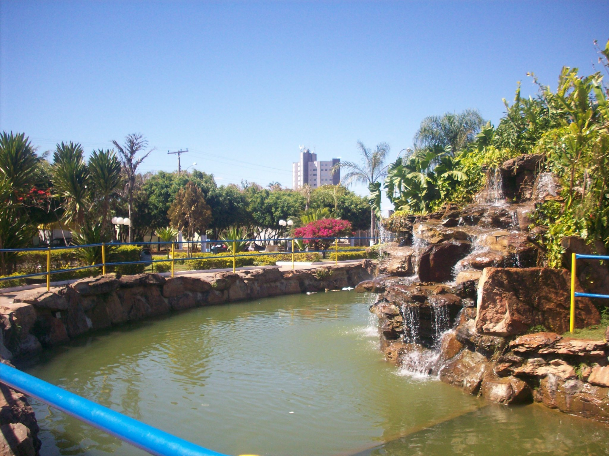 Lago com Cachoeira Praça Otto Monh em Cristalina.